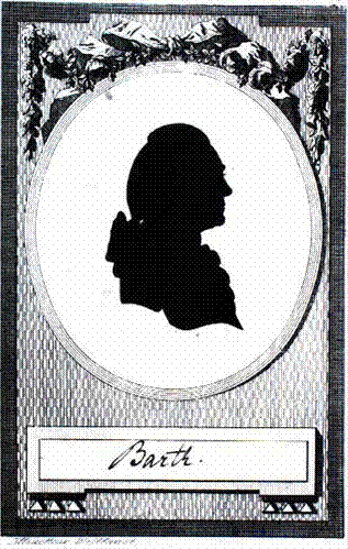 Beskrivelse: Silhuet af oboisten Christian Samuel Barth fremstillet af Weitlandt